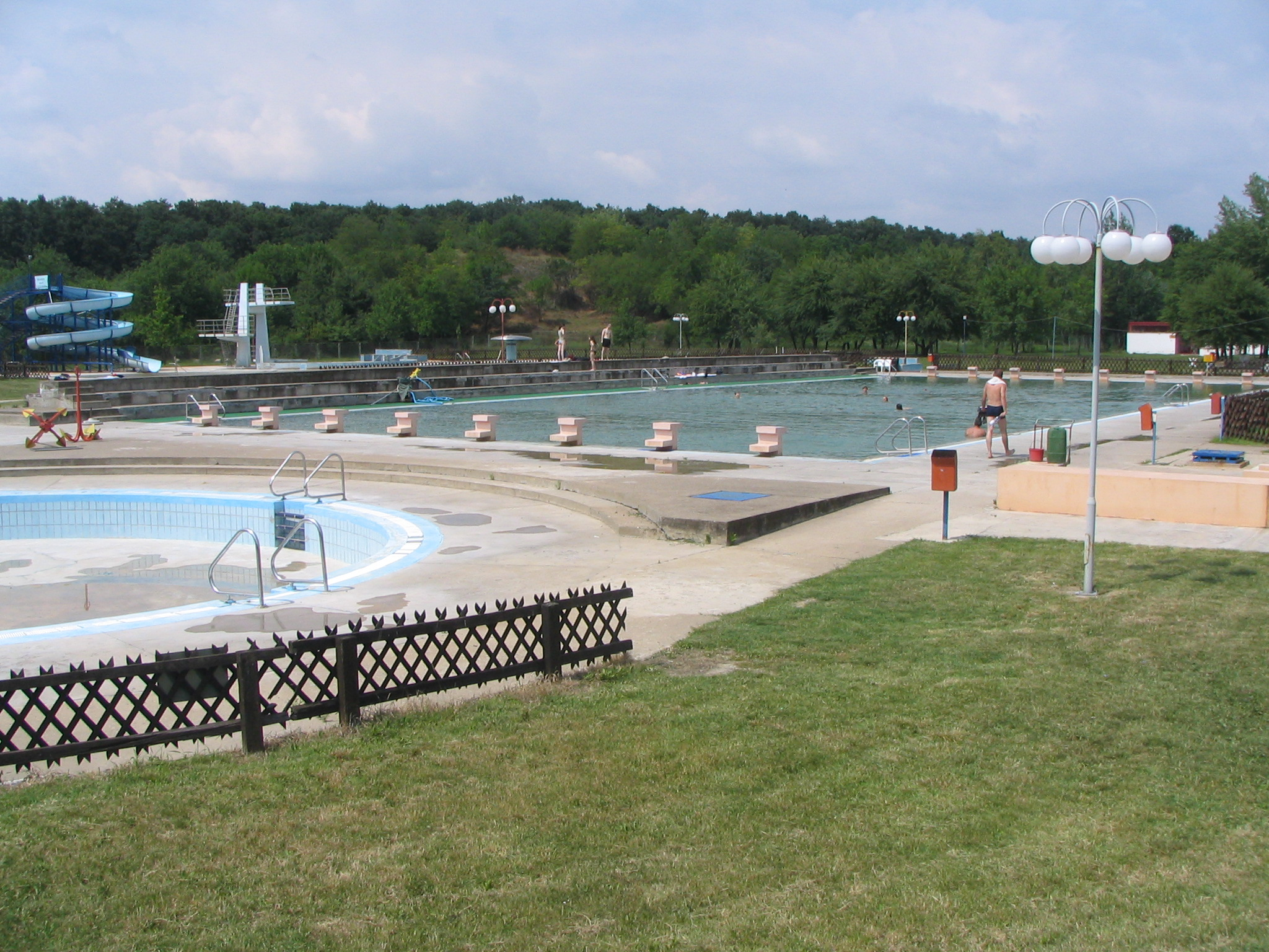 Базени Бање Јунаковић (фото: Михаило Грбић, 5. јуни 2007.